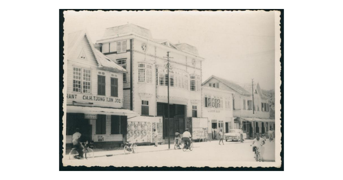 Straatgezicht in Paramaribo (Suriname) met Cinema Luxor, ca. 1950